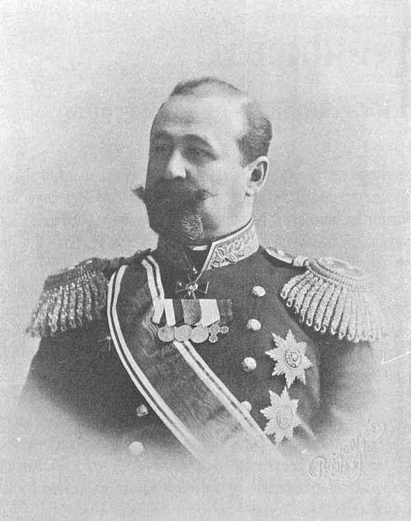 Князь Иван Михайлович Оболенский, генерал-лейтенант, финляндский генерал-губернатор.